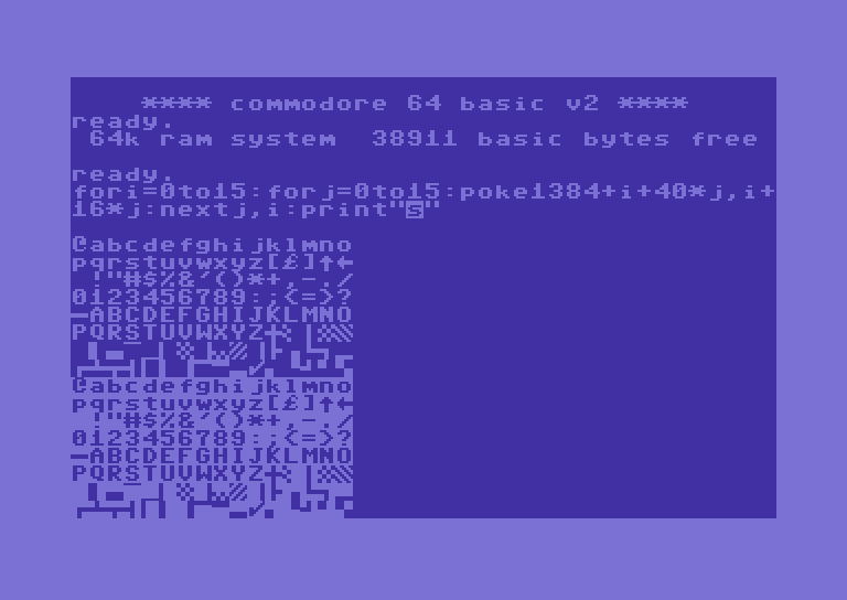 Kleinschriftfont des Commodore 64